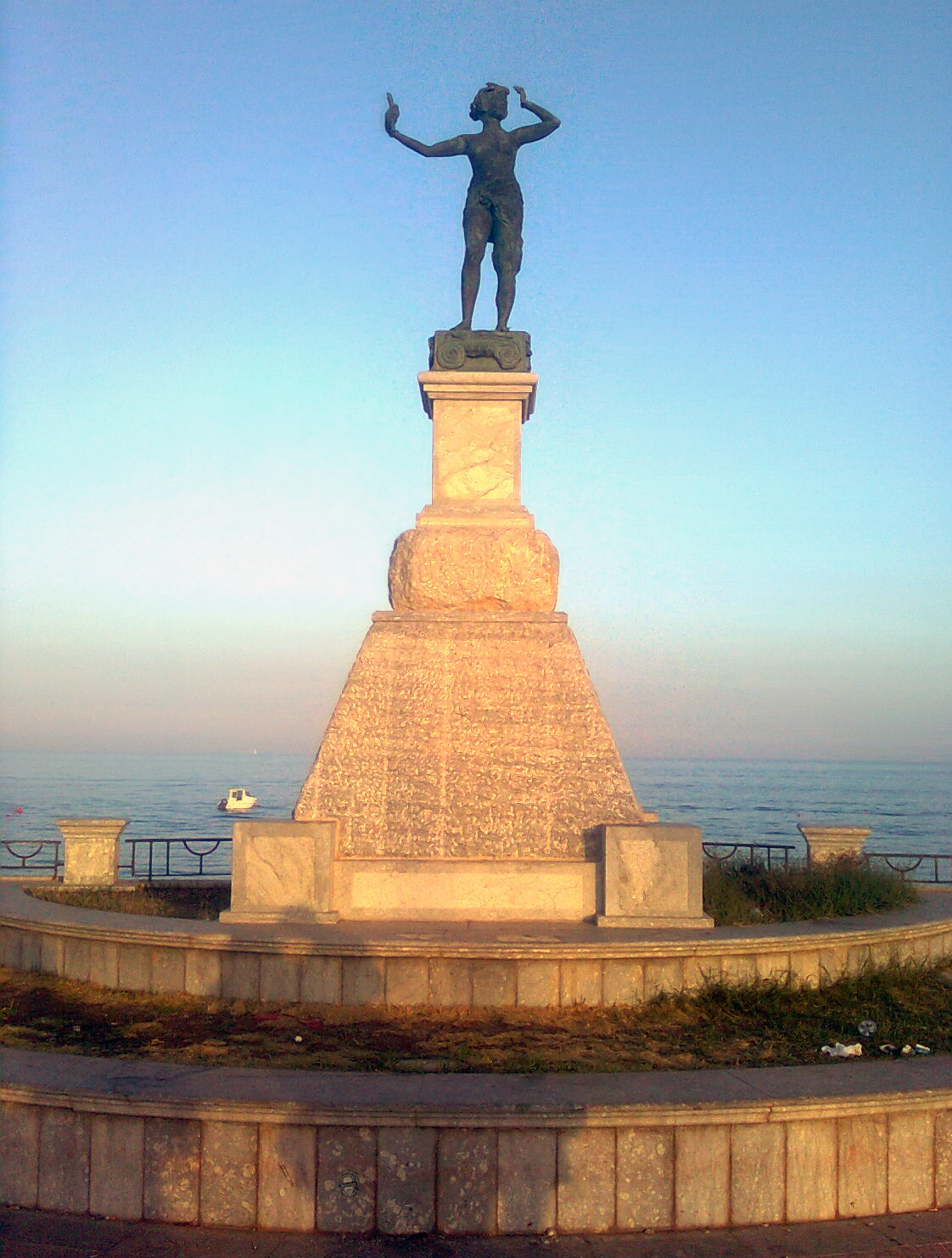 Nome scultura: Monumento a NossideUbicazione: Locri